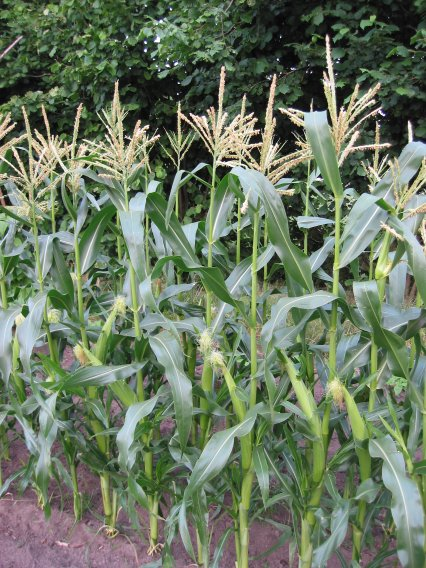 zelfgemaakte foto van suikermais 'Tasty sweet'